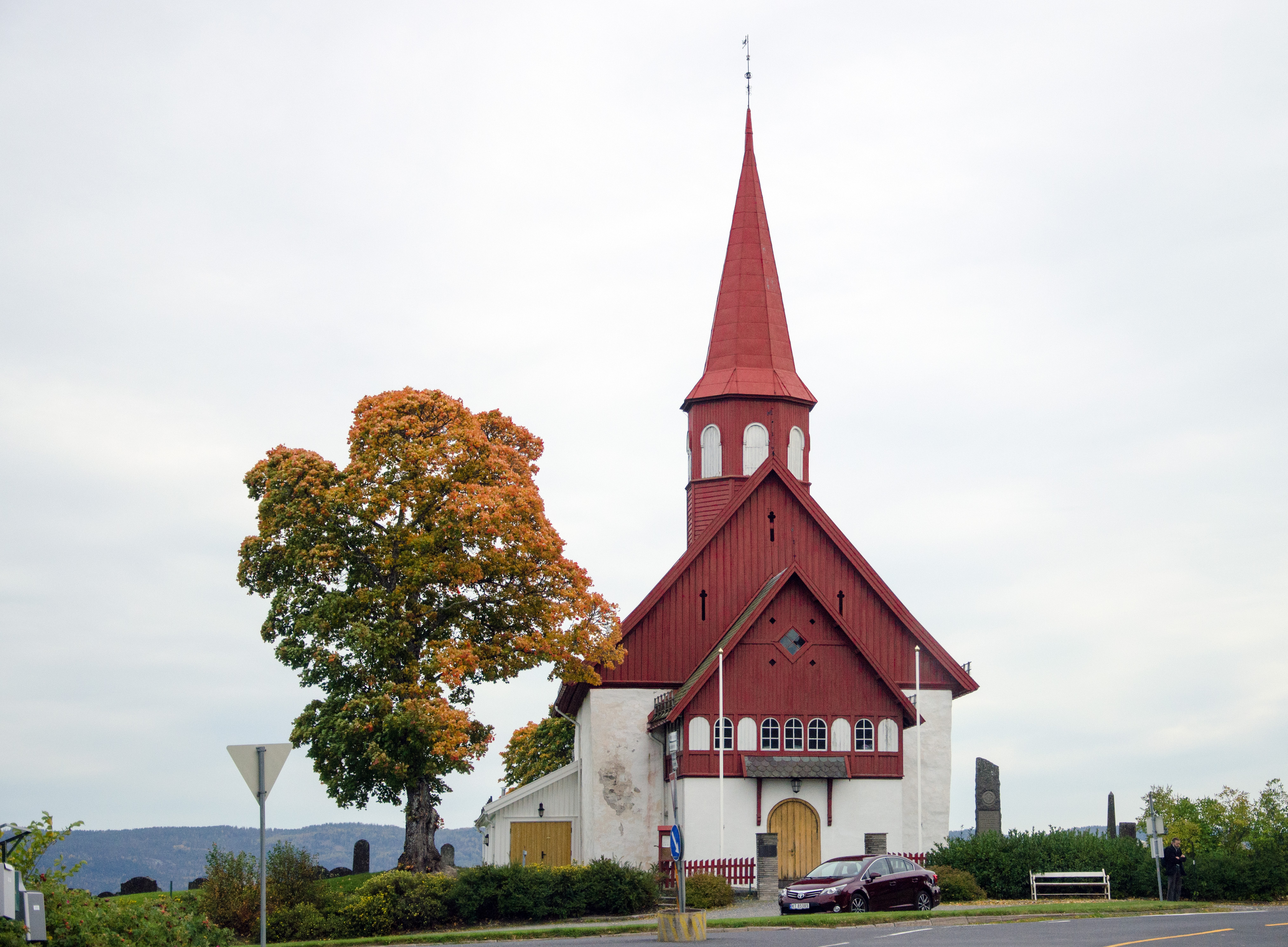 Hedenstad kirke i Kongsberg kommune